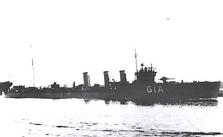 Der britische Zerstörer SIMOOM, der 1917 verloren ging